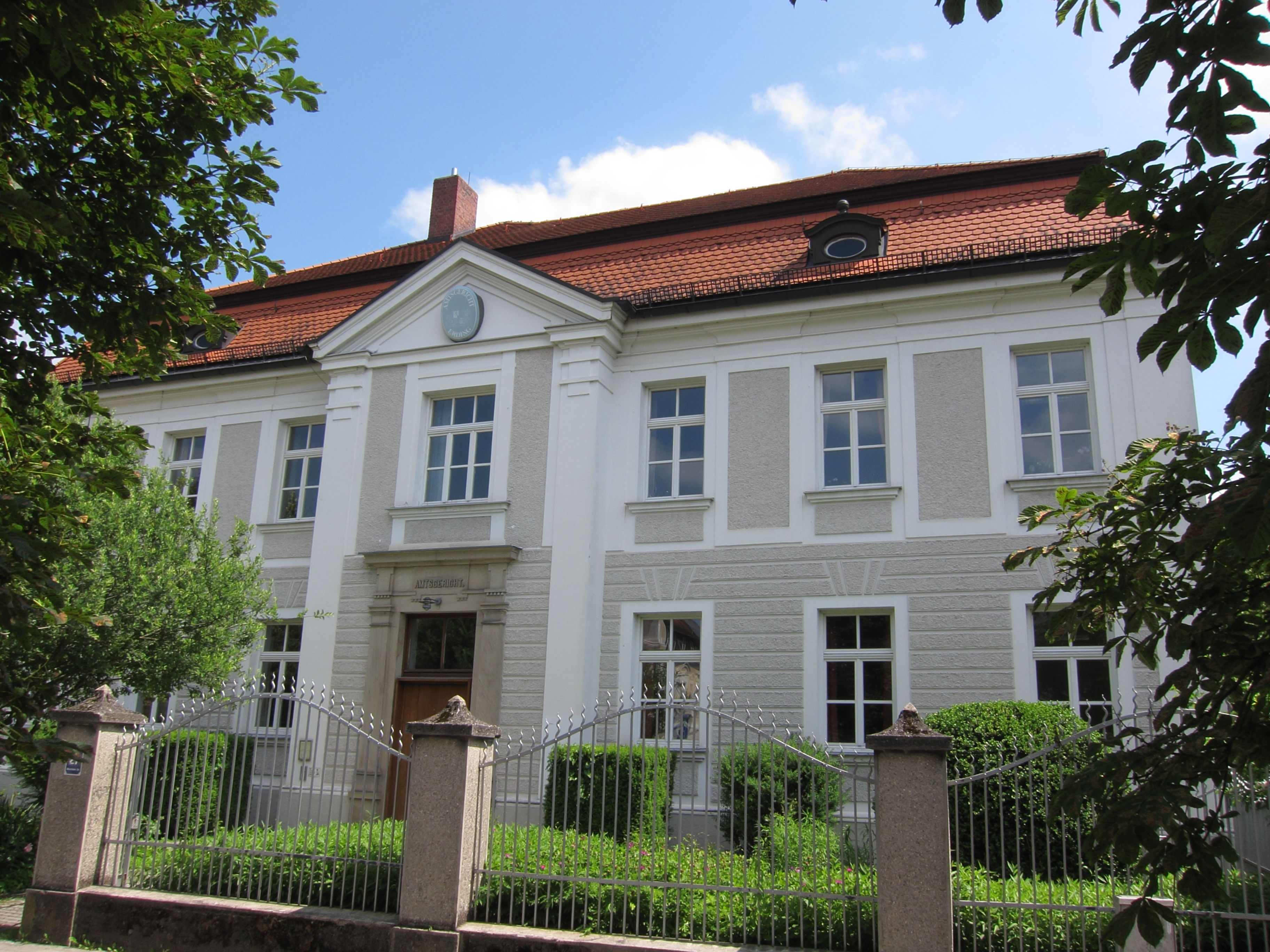 Münchner Straße 27; Amtsgericht; zweigeschossiger Putzbau mit neubarocker Fassadengliederung und Mansardwalmdach, wohl 1901; Einfriedung, schmiedeeiserner Zaun mit Tor, gleichzeitig.